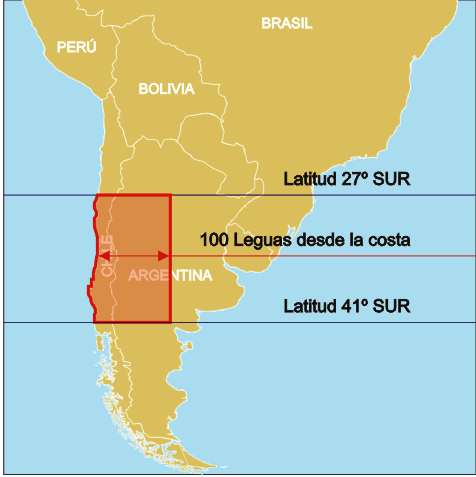 Gobernación de Pedro de Valdivia en 1548 — período colonial en Chile.